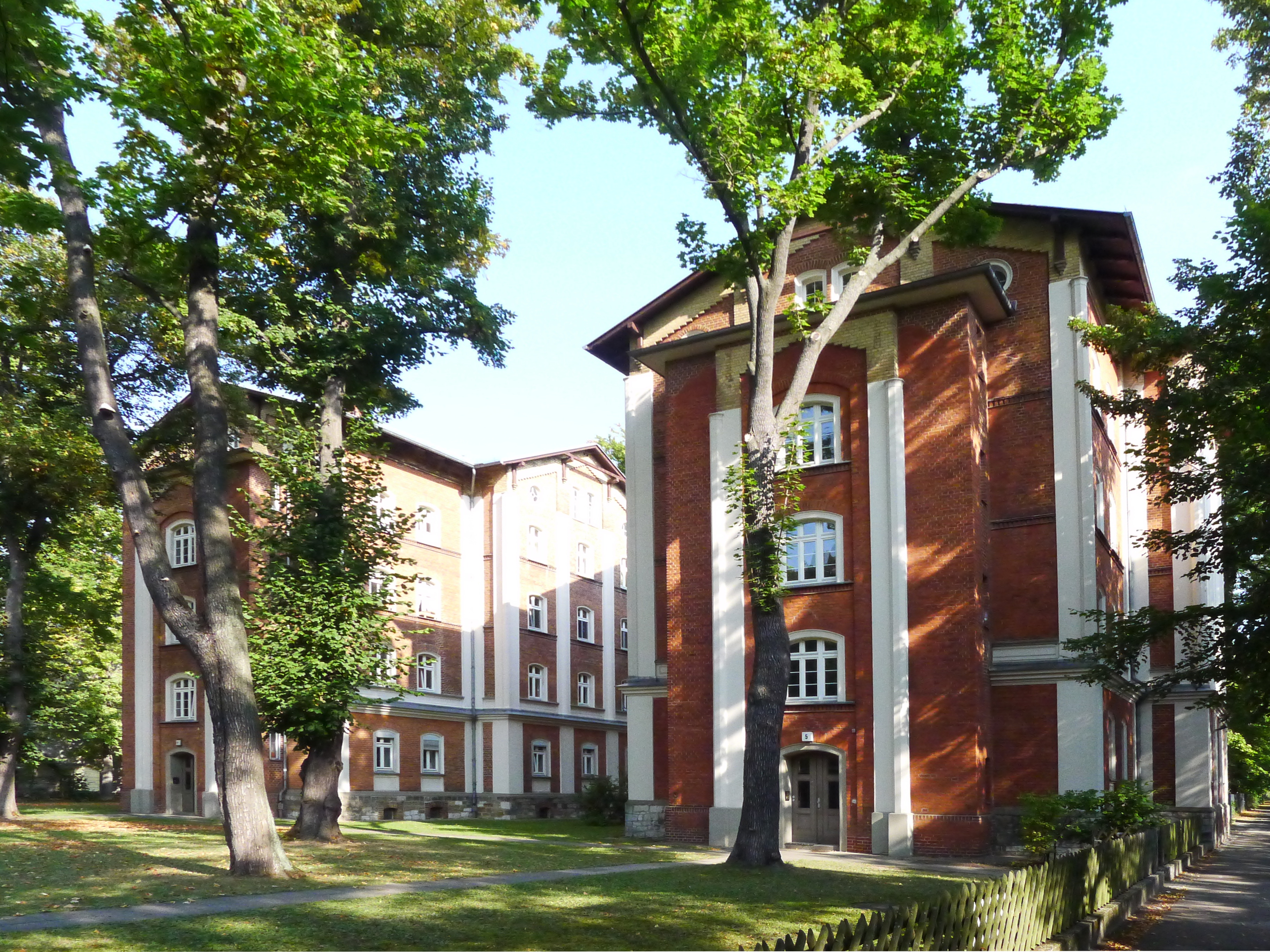 Wohnanlage